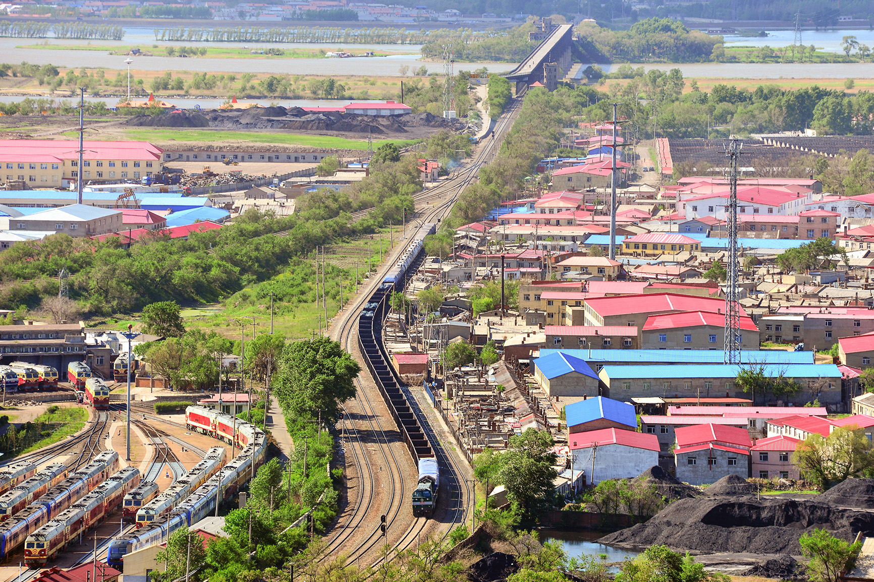 photo by Xundaogong 巡道工出品 86614次